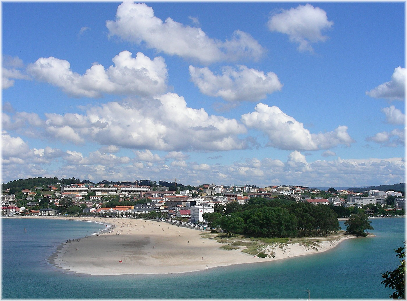 Praia Santa Cristina na Ría do Burgo. A primeira parte é do Concello de Oleiros e a outra metade que se mete na ría pertence ó concello da Coruña.